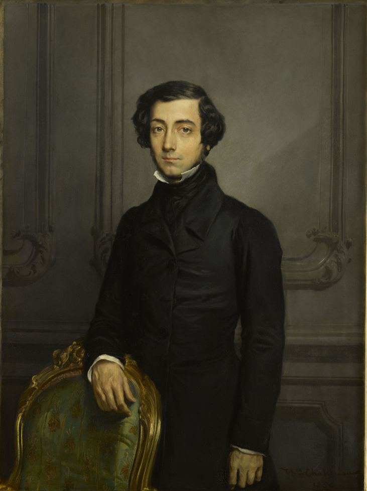 Alexis de Tocqueville